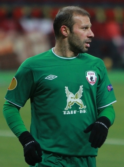 Гекдениз Карадениз игрок ФК Рубин